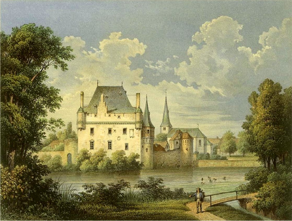 Burg Satzvey, Kreis Euskirchen, Lithografie aus dem 19. Jahrhundert